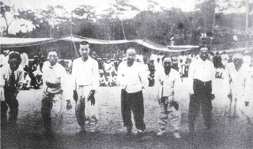 마라톤 (윤치호, 안창호 외)